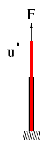 Ein Stab (schwarz) wird von einer Kraft F {\displaystyle F} um den Betrag u {\displaystyle u} gedehnt (rot)